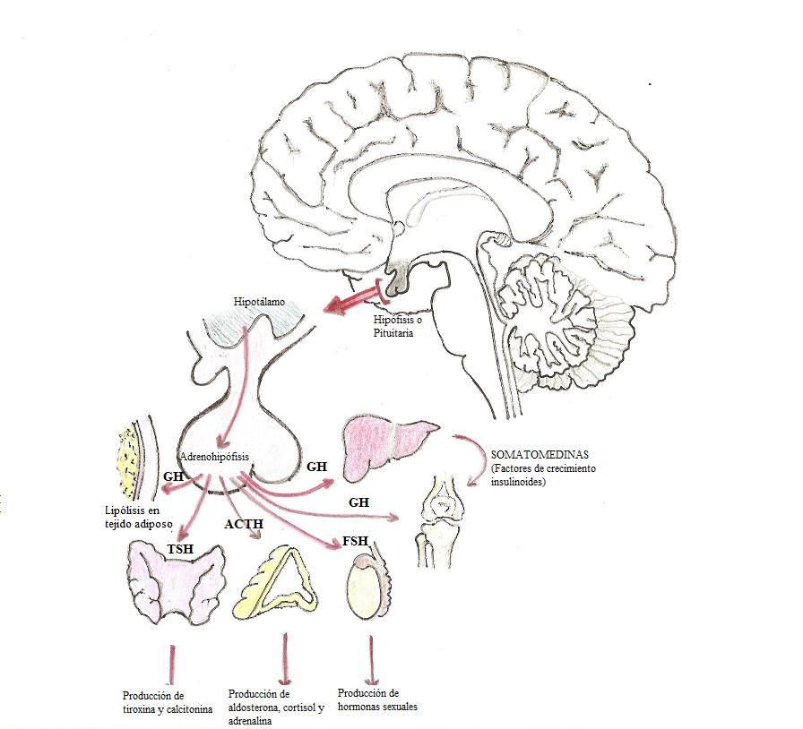 Accion de la pituitaria en órganos y glándulas.